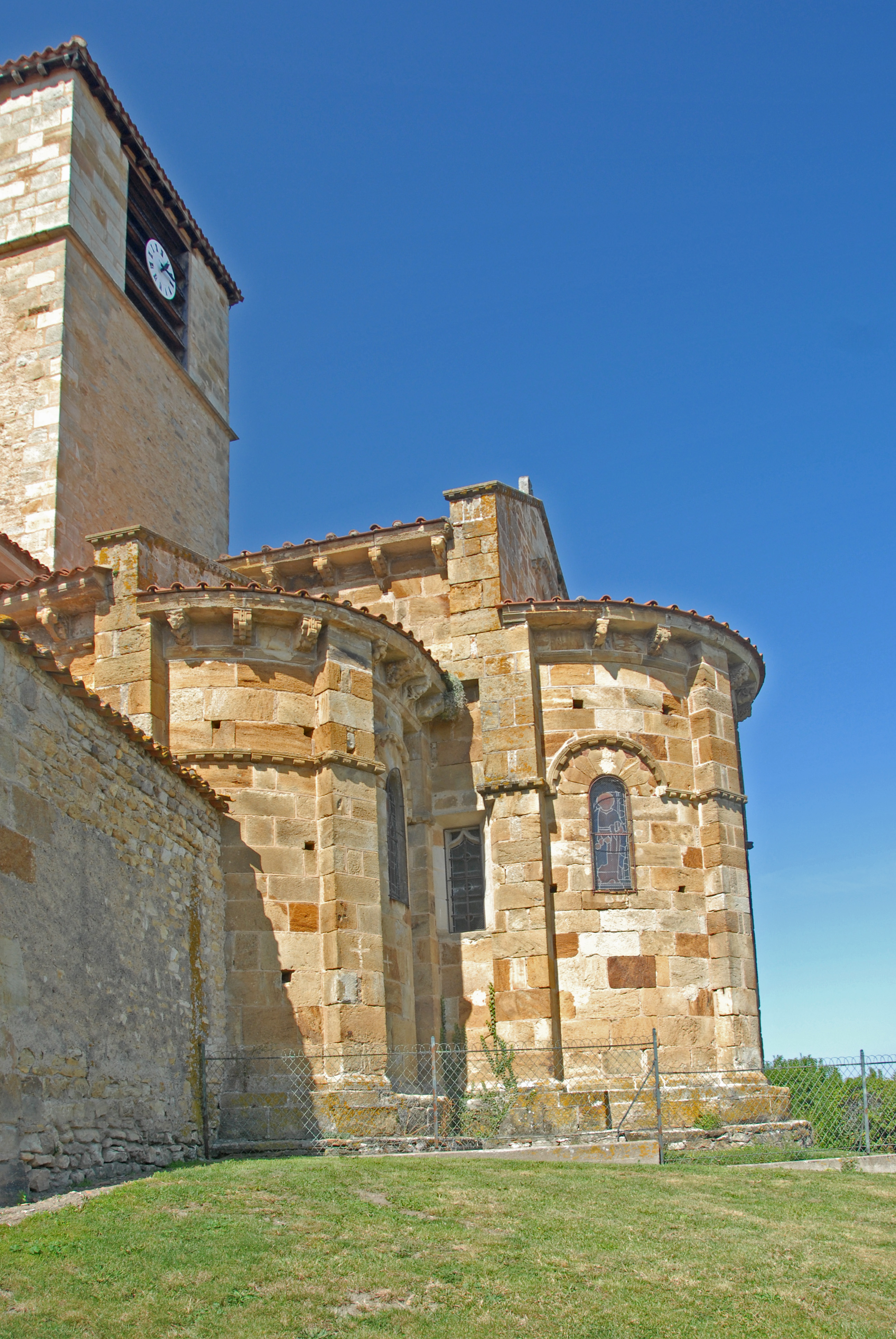 St.-Jean Glaine-Montaigut, Chorhaupt von S